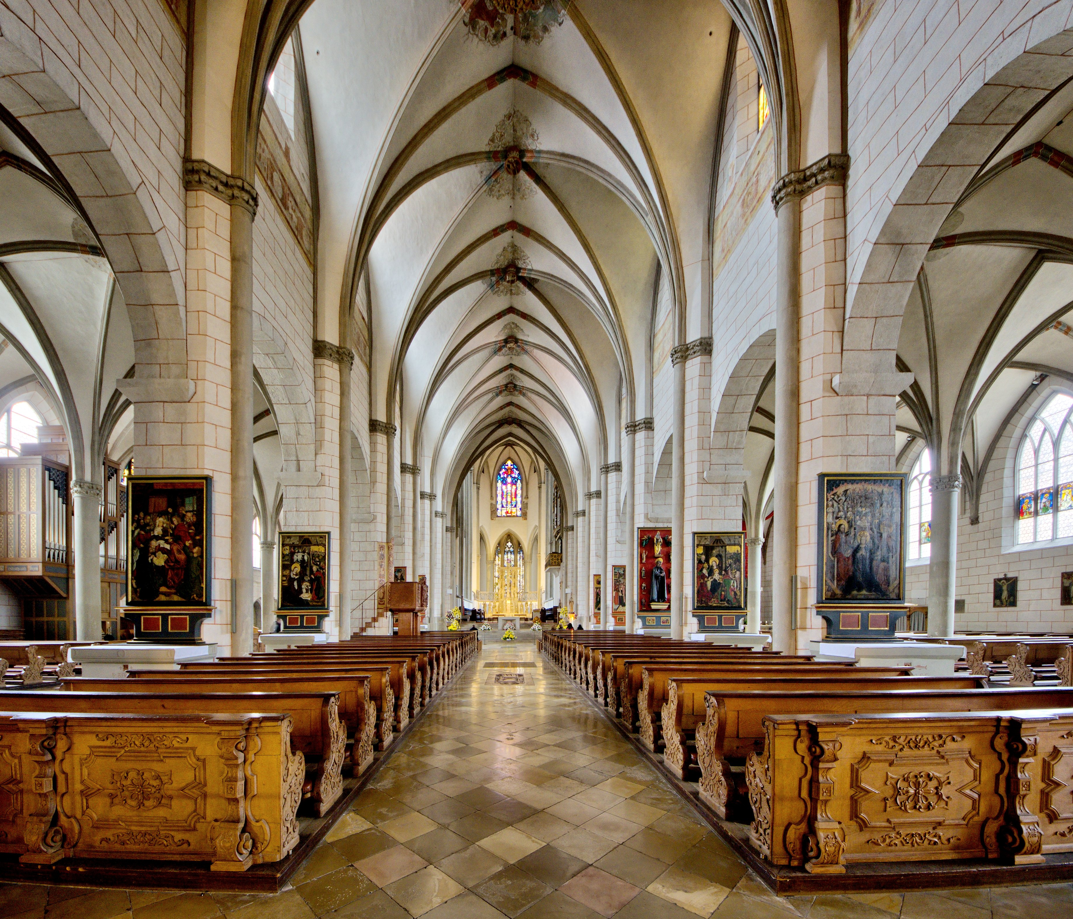 Bilder aus dem Augsburger Dom